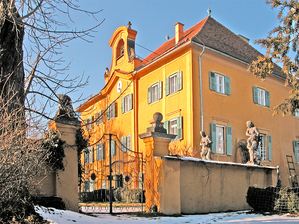 Sankt Nikolai im Sausal Schloss Flamhof ObjektID: 40540